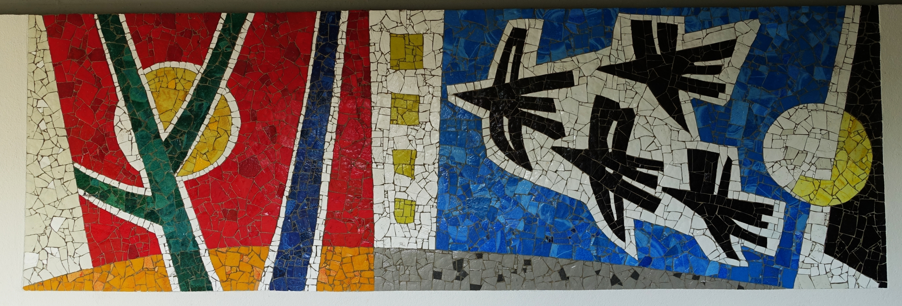 Mosaik, Vogelzug, von Hans Weidmann (1918–1997), Wasgenringschule Basel. Im Auftrag des Kunstkredit-Basel. Gestaltung von sieben Pavillon-Trennwänden (1953–1955). Die Wandbilder von Otto Abt, Ernst Stocker und Hans Weidmann wurden 1958 resp. 1980/81 durch Mosaike ersetzt, das stark beschädigte Werk von Theo Eble 1986 restauriert.